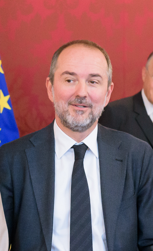 Thomas Drozda bei seiner Angelobung als Kanzleramtsminister